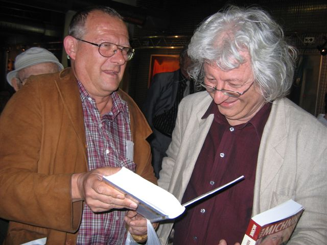 Adam Michnik (b. 1946), Polish journalist and essayist and Péter Esterházy (b. 1950), Hungarian writer